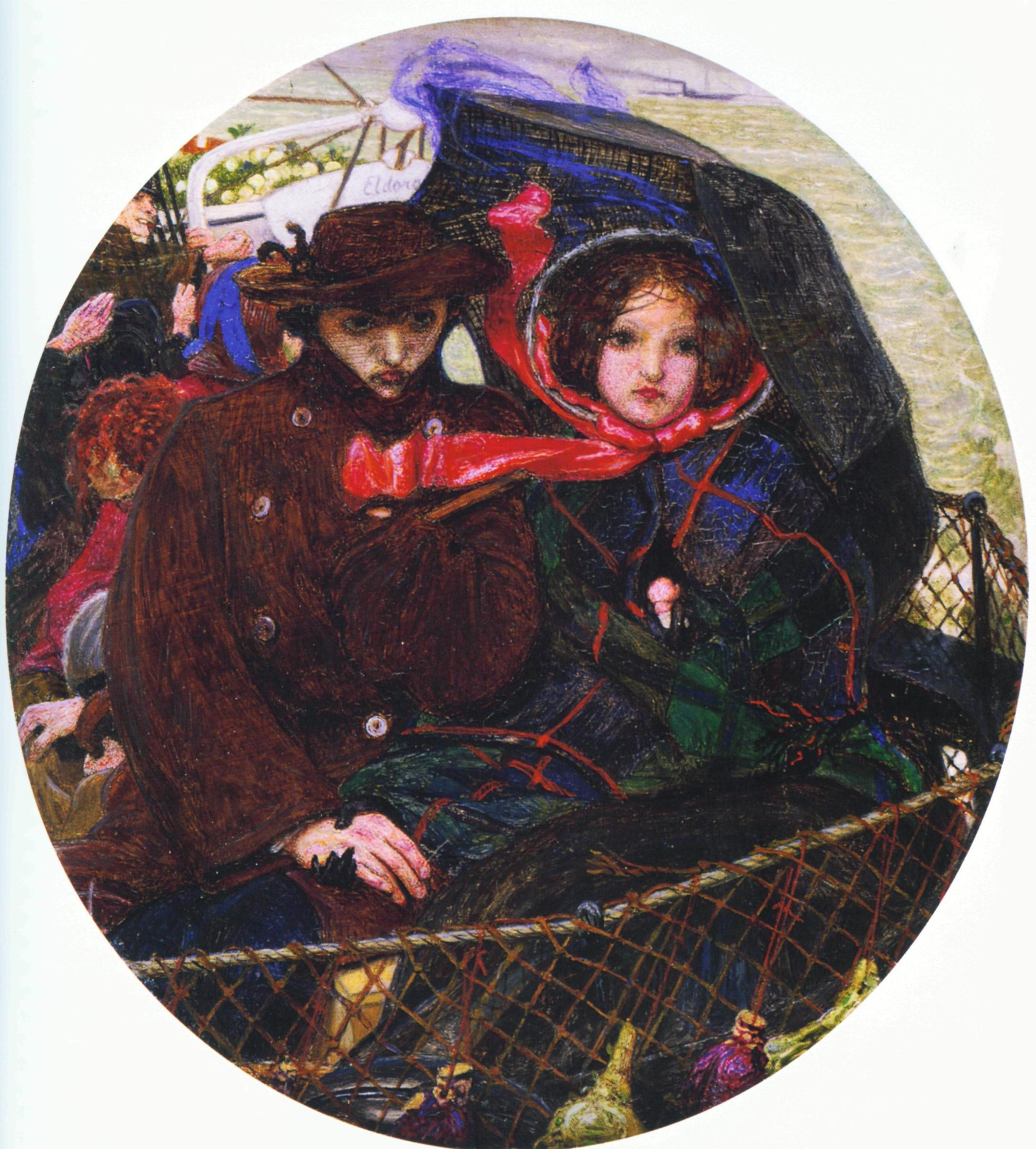 study